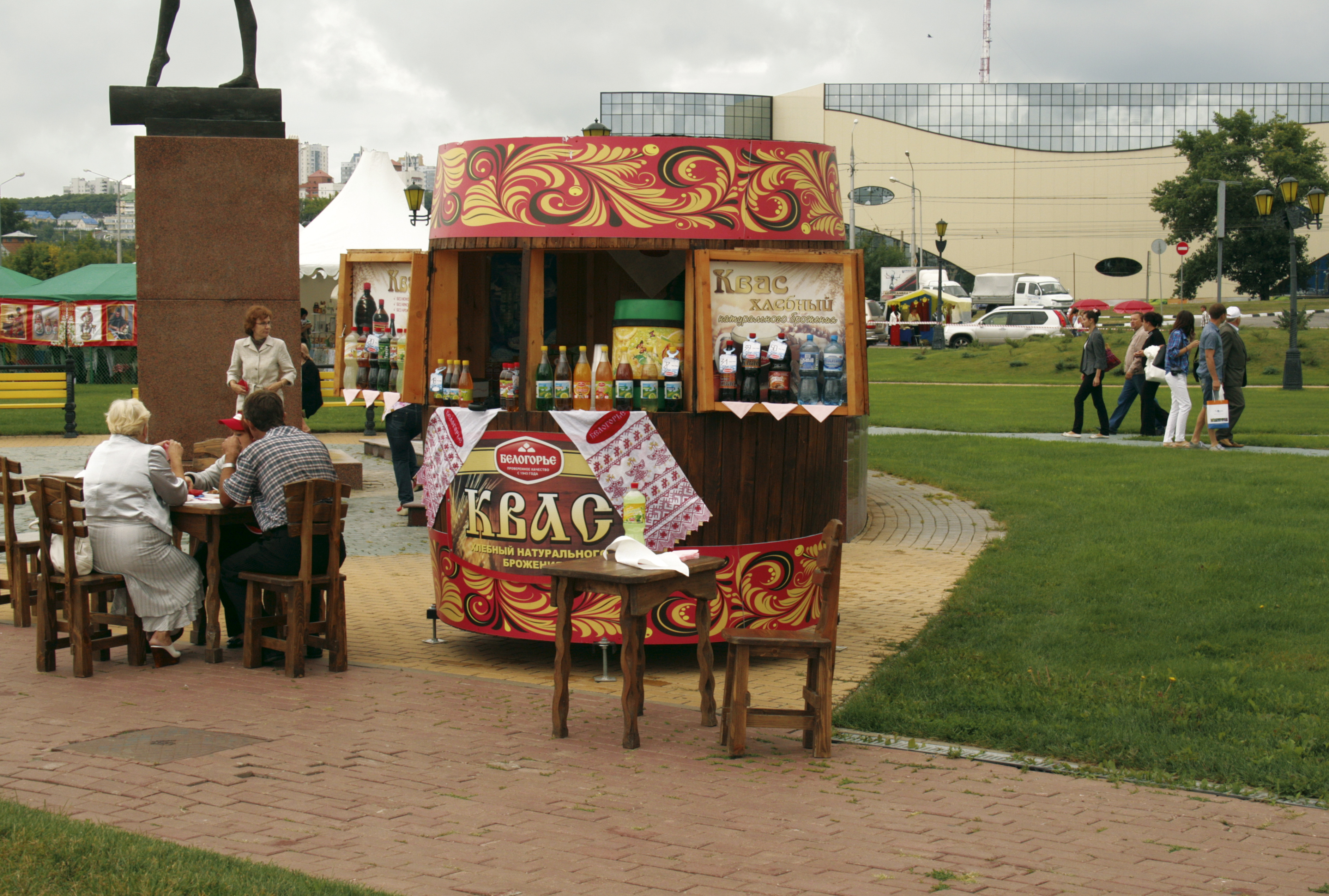 Ларёк «Бочка кваса». Белгород. Фестиваль-ярмарка «Белгородская слобода», 2013